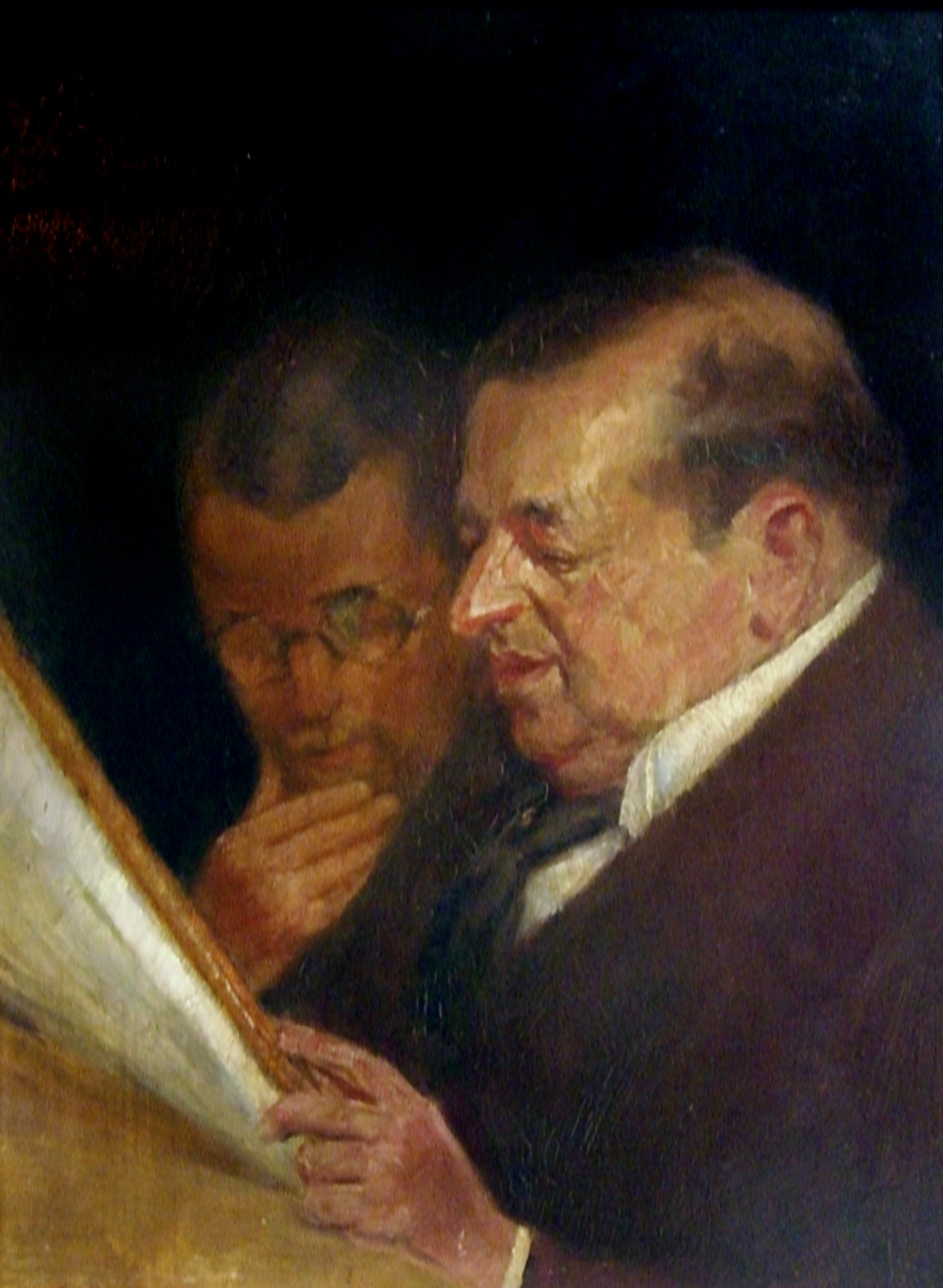 Karl Rixkens: Zwei Herren beim Studium der Zeitung. Öl auf Holz, 43,5 x 32 cm